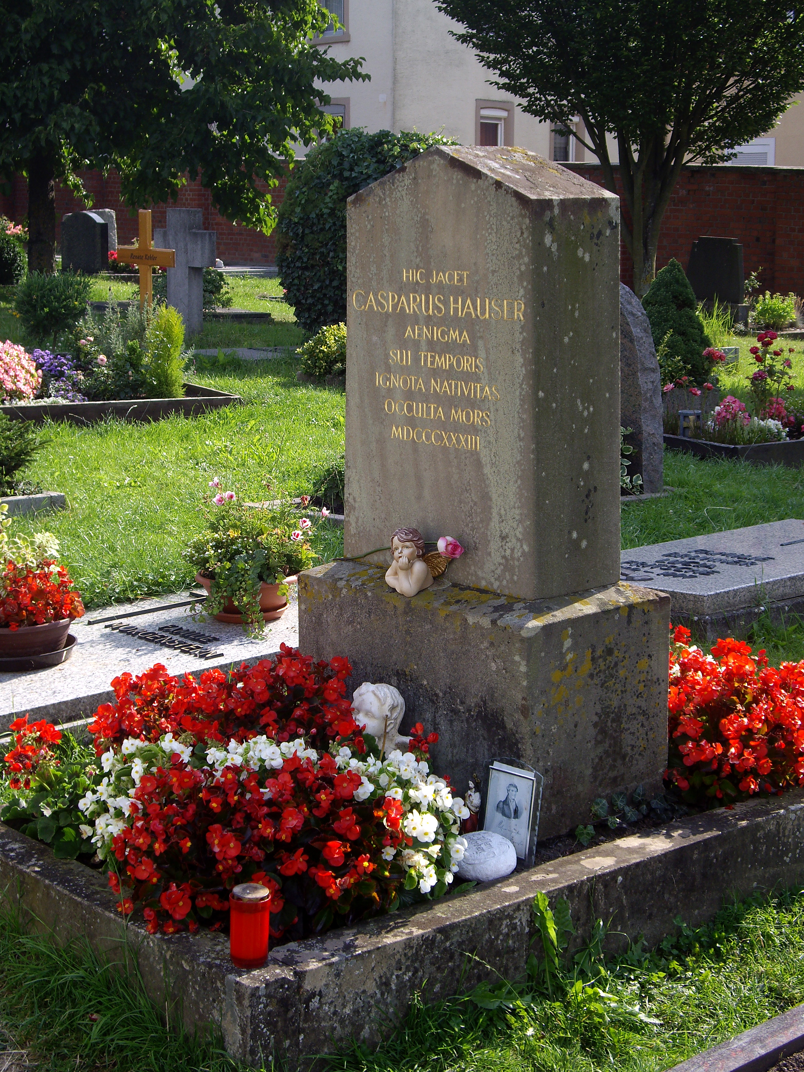 Grób Kaspara Hausera na cmentarzu w Ansbach